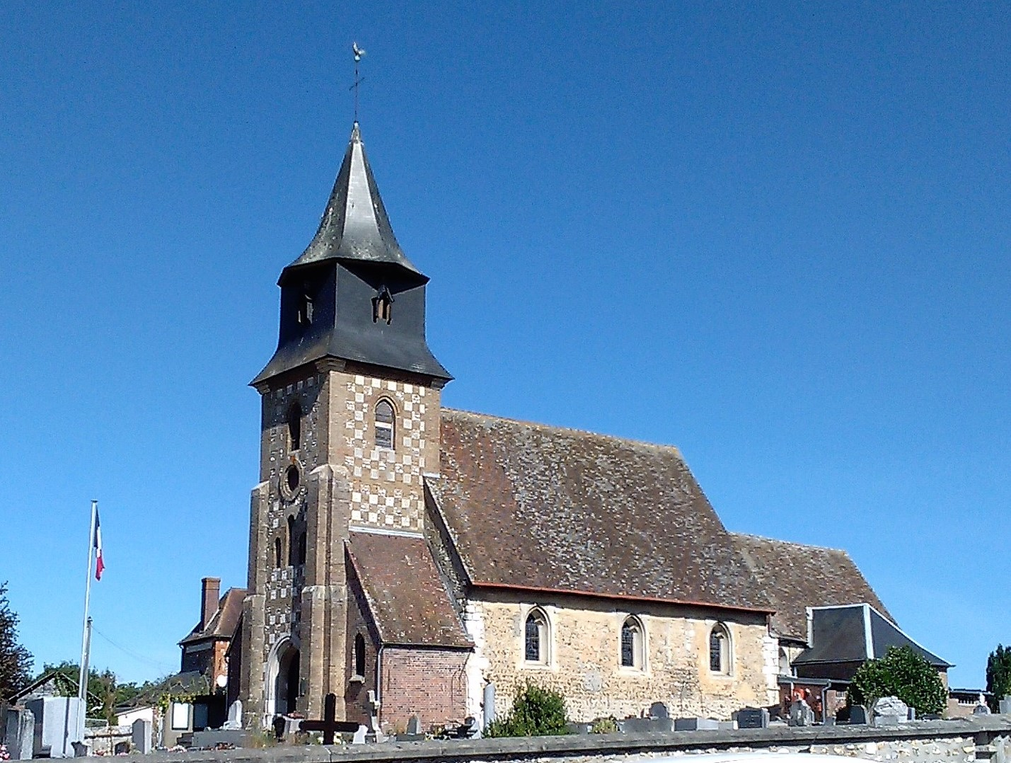 L'église Saint-Sulpice de Gravigny, Eure.